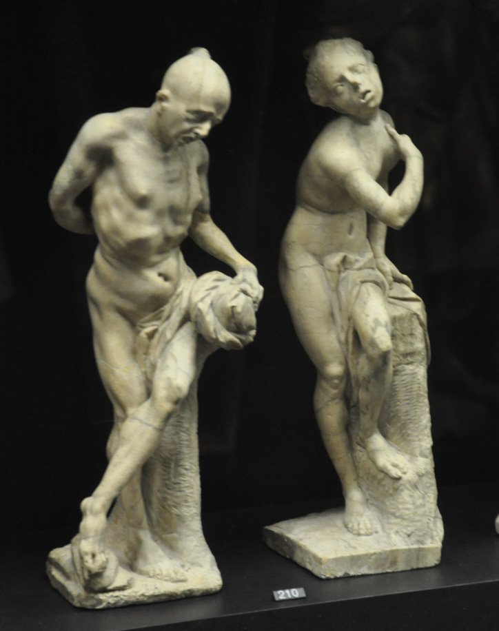 Johann Georg Weckenmann (1727–1795): Sklave und Sklavin (Tatar und Tatarin), aus dem Hagschloss bei Haigerloch (Tatarenzimmer); Oberschwaben zwischen 1761 und 1773; Alabaster Liebieghaus, Frankfurt am Main, Inv. Nr. 690–691 (ausgestellt im Schaudepot)